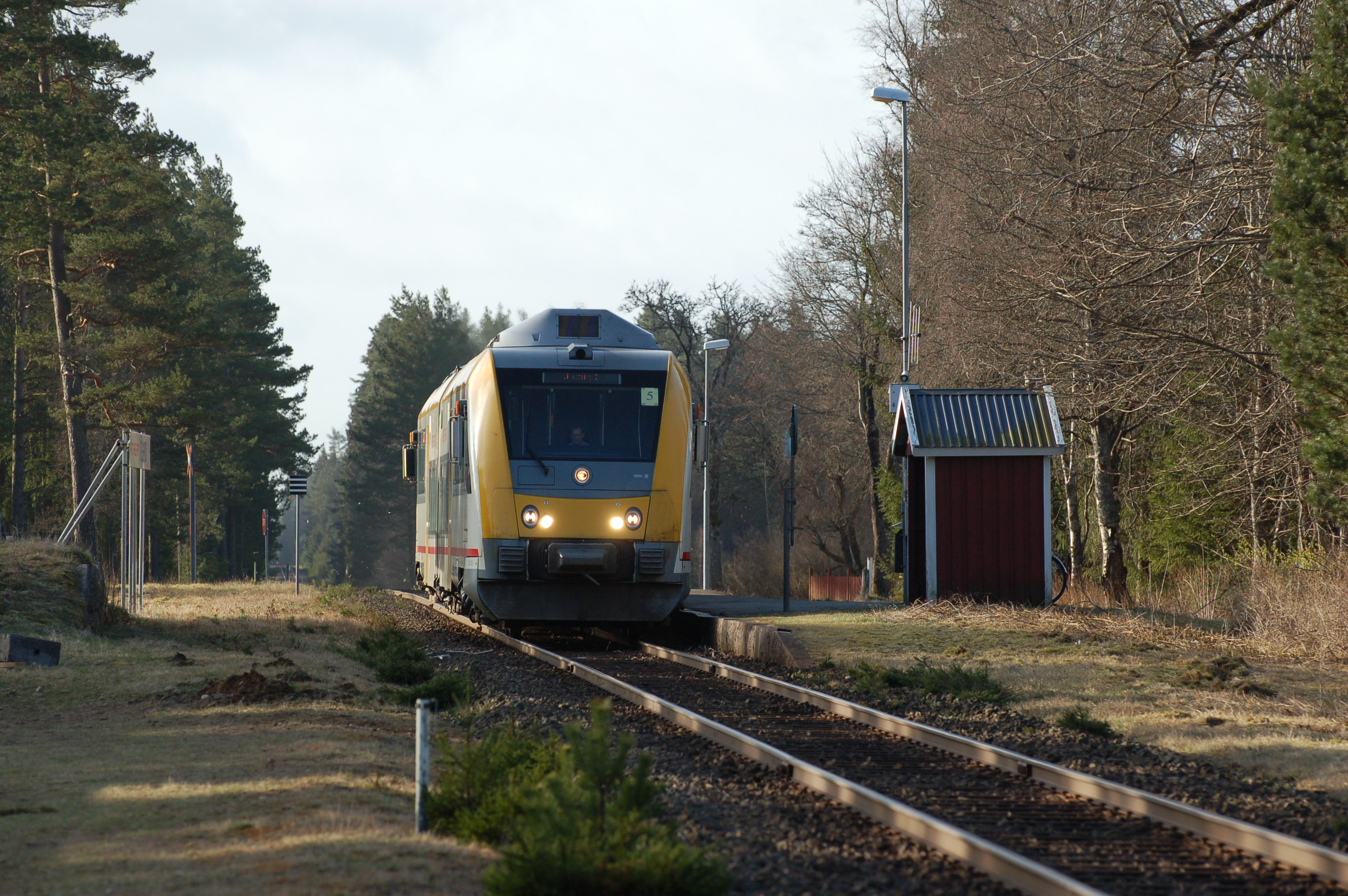 Motorvagn ITINO Y31 1405 "Emil i Lönneberga" i Tåg 8540 passerar Ekeryds hållplats på HNJ Vaggerydsbanan mellan Jönköping och Vaggeryd.